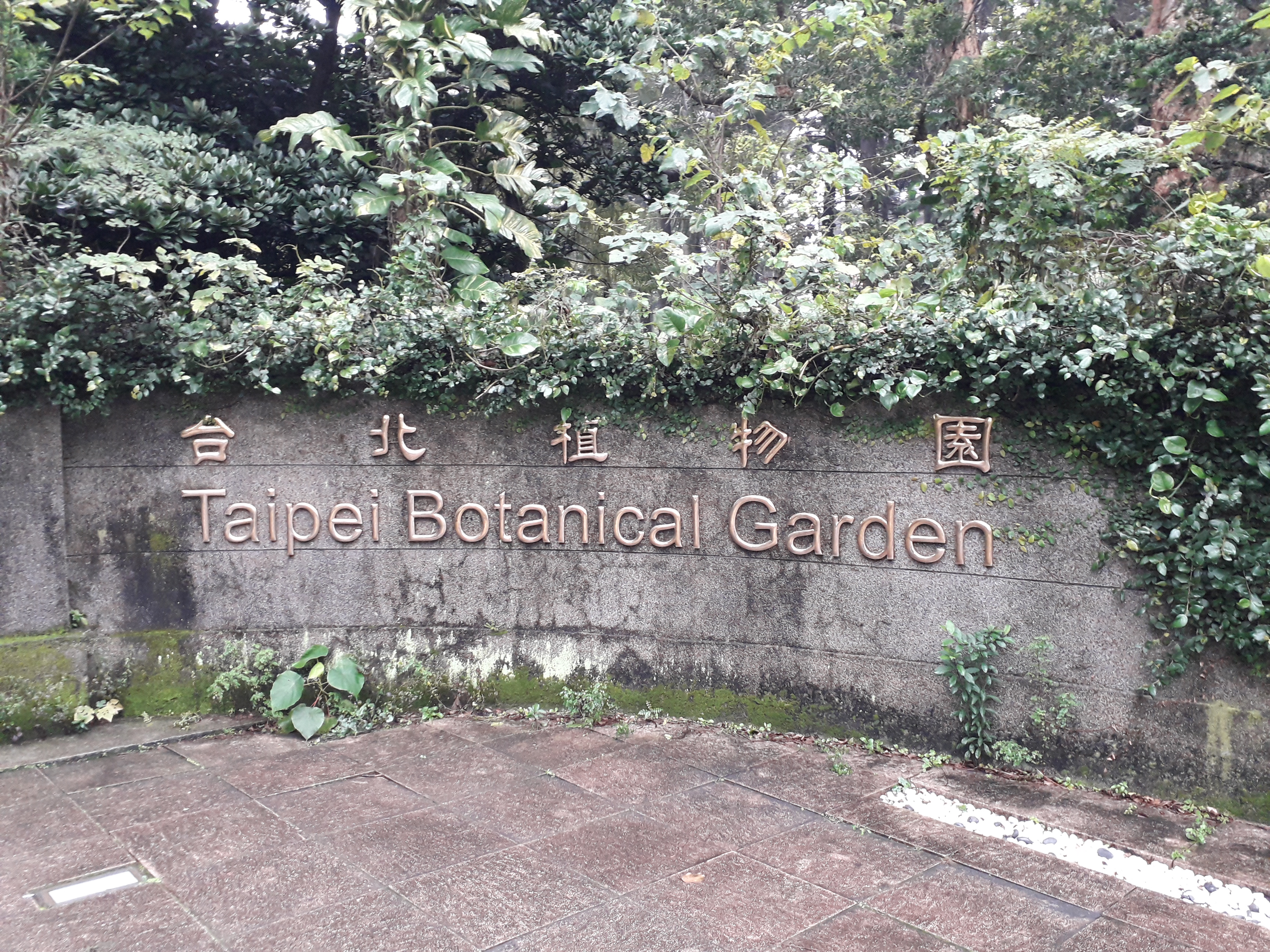 Eingang des Botanischen Gartens Taipeh